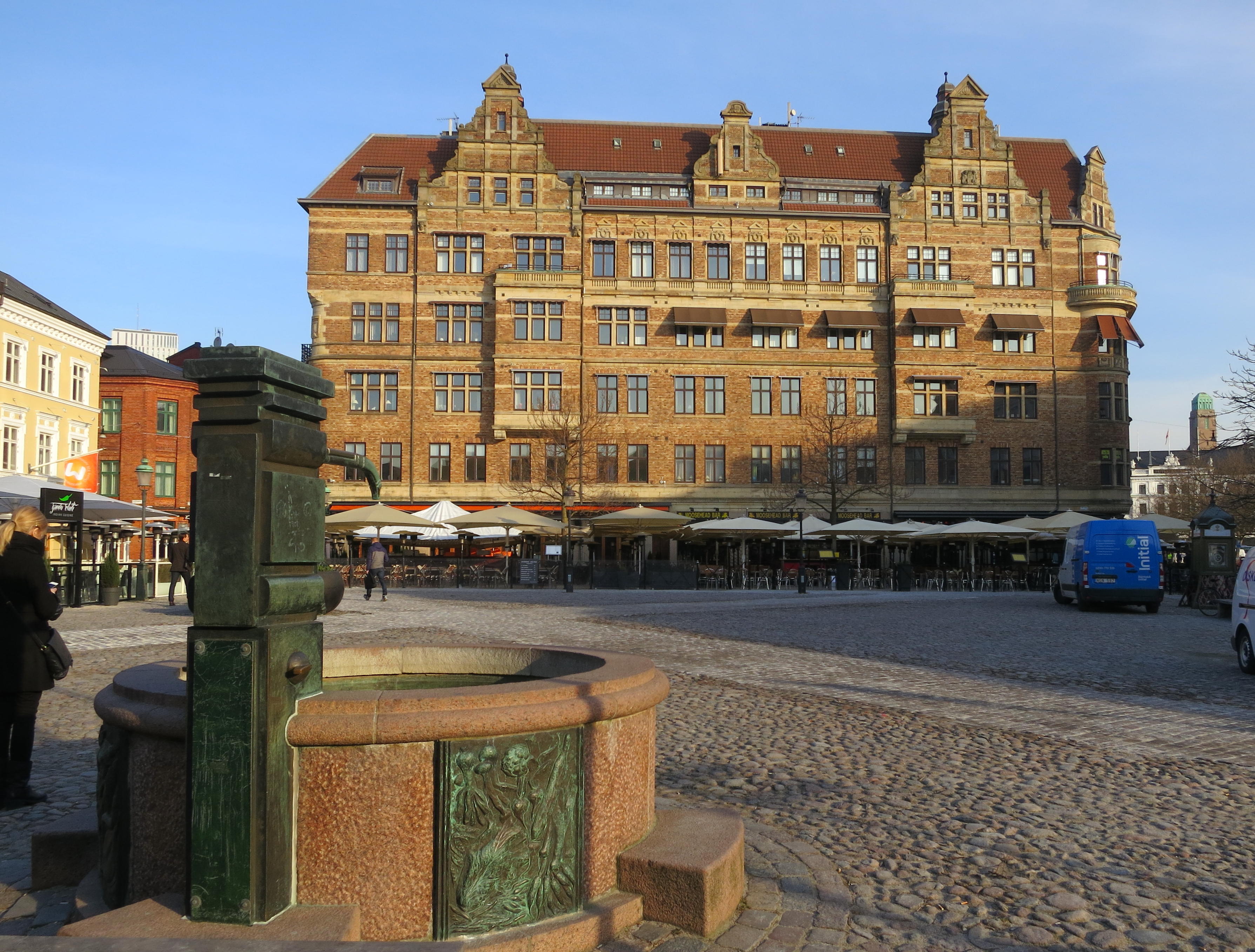 Lilla Torg, Malmö, mars 2015